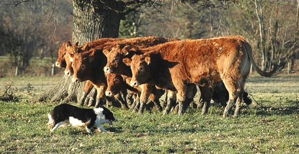 Vickie au test d'aptitudes naturelles sur troupeau de bovins